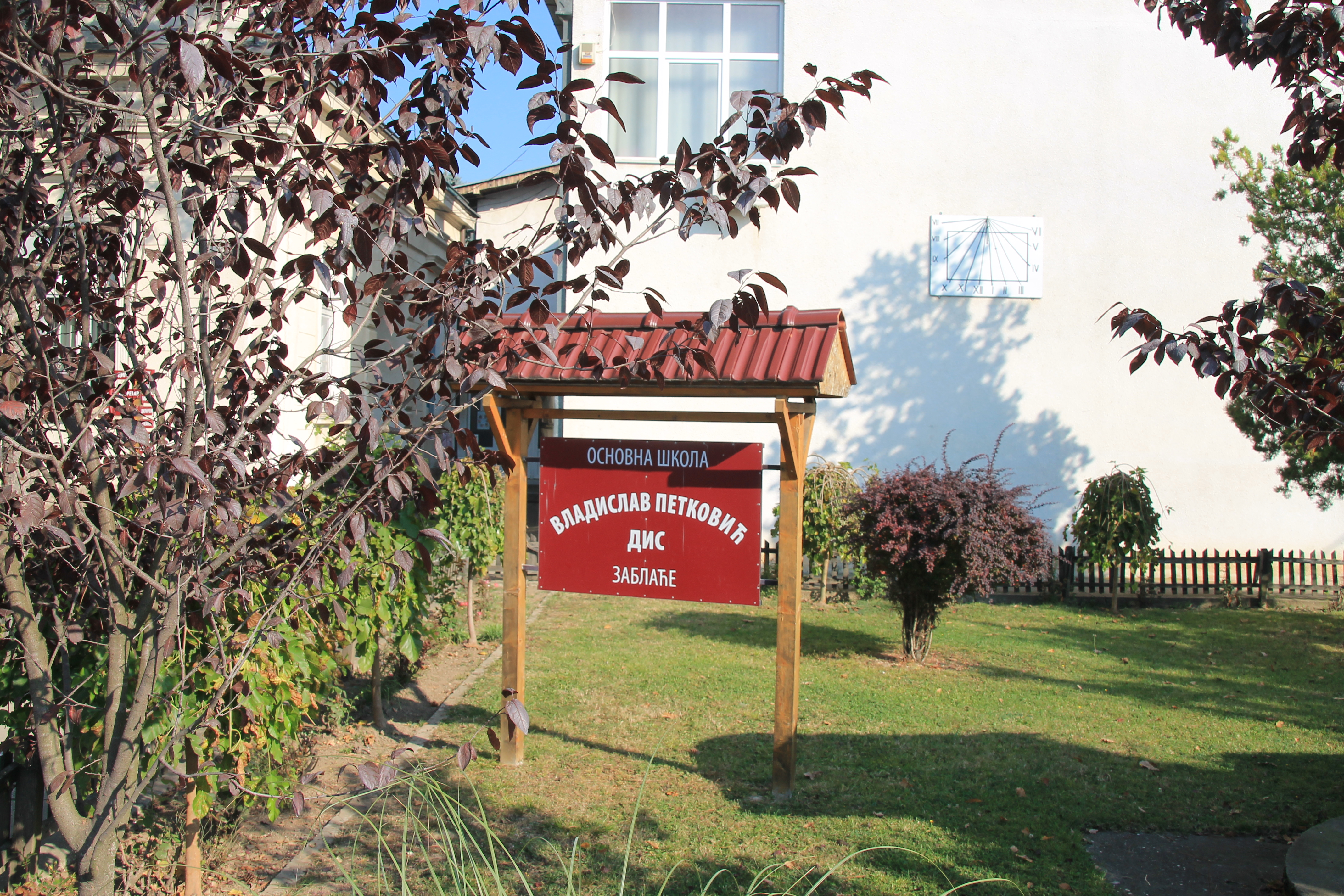 OŠ Vladisav Petković Dis Zablaće